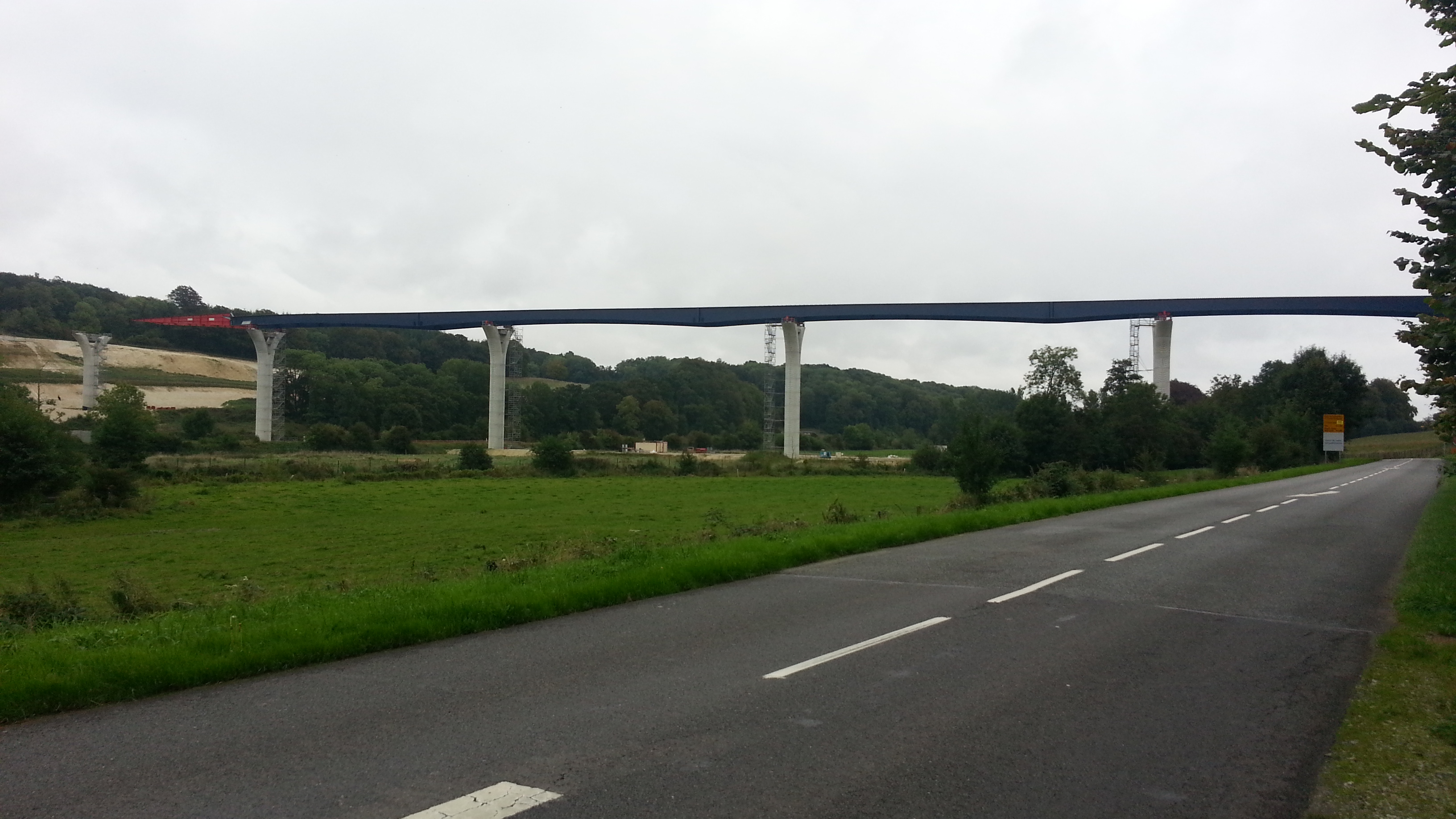 Le viaduc de la Scie en septembre 2013